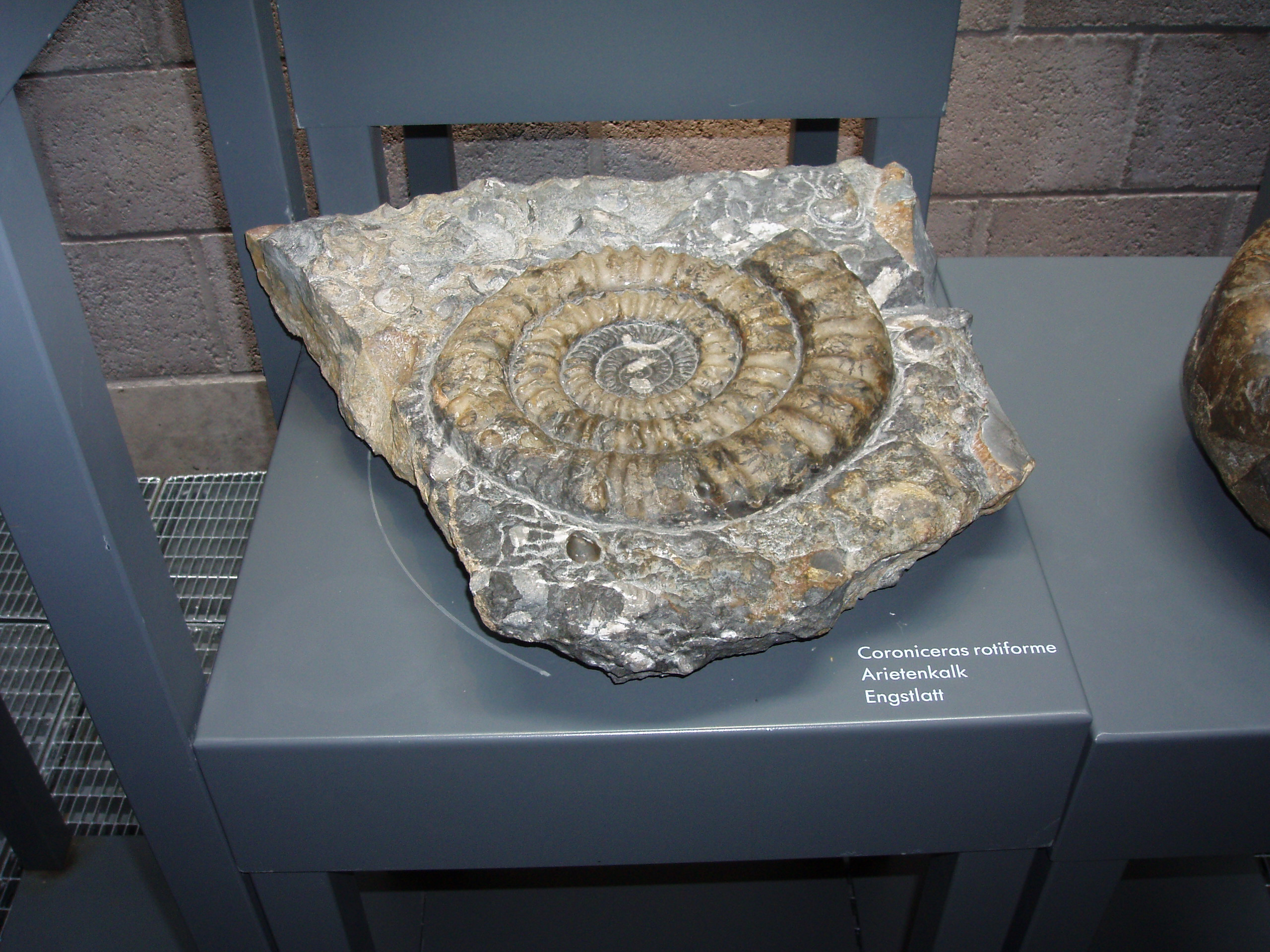 Coroniceras rotiforme im Museum der Holcim